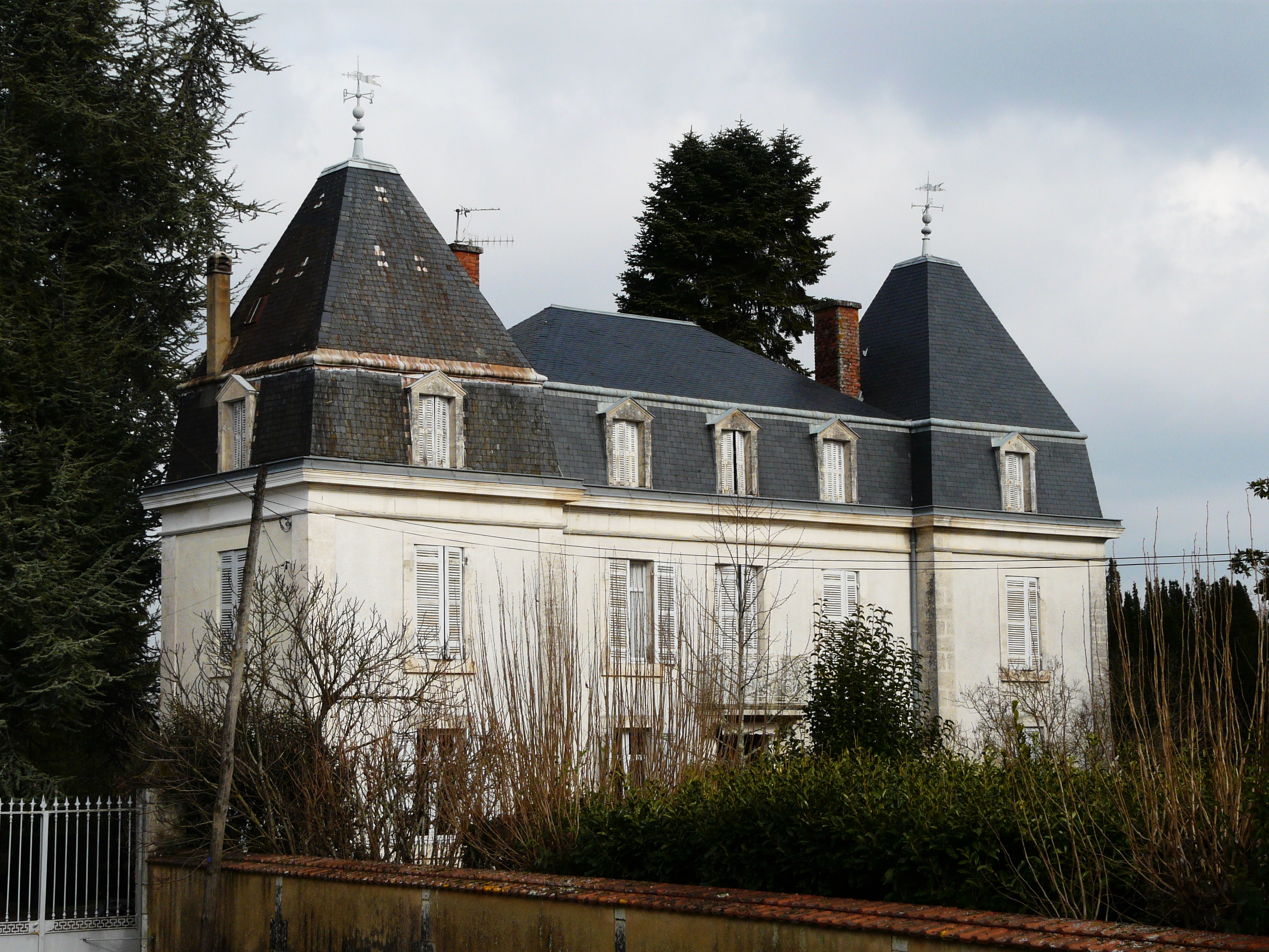 Maison bourgeoise à Église-Neuve-de-Vergt, Dordogne, France